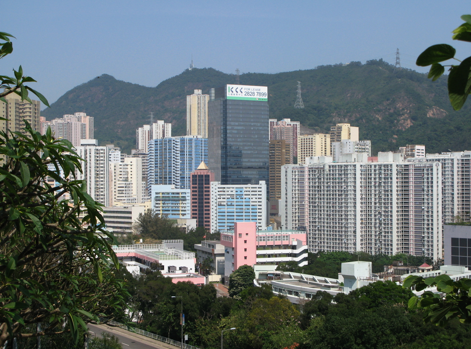 Kwai Chung Skyline 葵涌